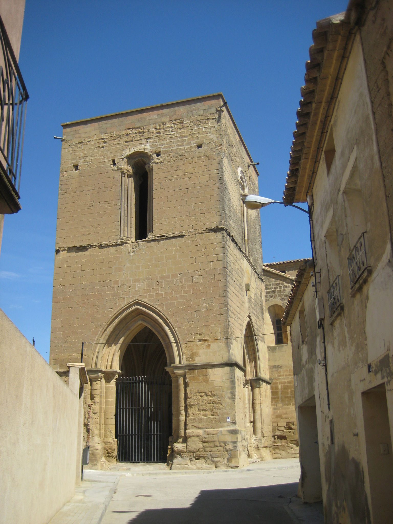 Se trata de una iglesia construida en el s.XII en estilo románico tardío, que debido a su importancia llegó a ostentar el rango de colegiata. Su fábrica es de sillar y actualmente se encuentra exenta. Consta de tres naves y cabecera triple con ábsides semicirculares cubiertos por bóveda de horno. Las naves se cubren con bóvedas de cañón y el crucero, no marcado en planta, con bóveda de crucería estrellada del s.XVI. También de época renacentista data la construcción del coro alto situado a los pies de la nave central y de la capilla de San Pedro Arbués, situada junto al coro. Su portada principal se abre en el muro septentrional y junto a ella existe una ventana sobre la que hay embutido un tímpano tallado con un Pantocrátor rodeado por el Tetramorfos y un crismón trinitario. En el muro meridional se encuentra adosado un gran atrio abierto por medio de tres arcos apuntados y cubierto por una bóveda de crucería sencilla. Las columnas situadas en los ángulos del atrio presentan bellos capiteles historiados. Sobre este atrio se alza una magnífica torre del s.XIII, de planta cuadrada y dos cuerpos en altura rematados por una terraza plana. Entorno